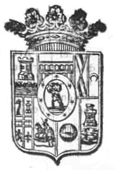 Escudo de la Provincia de Madrid tal como aparece en el Boletín Oficial de la Provincia de Madrid del 21 de mayo de 1903